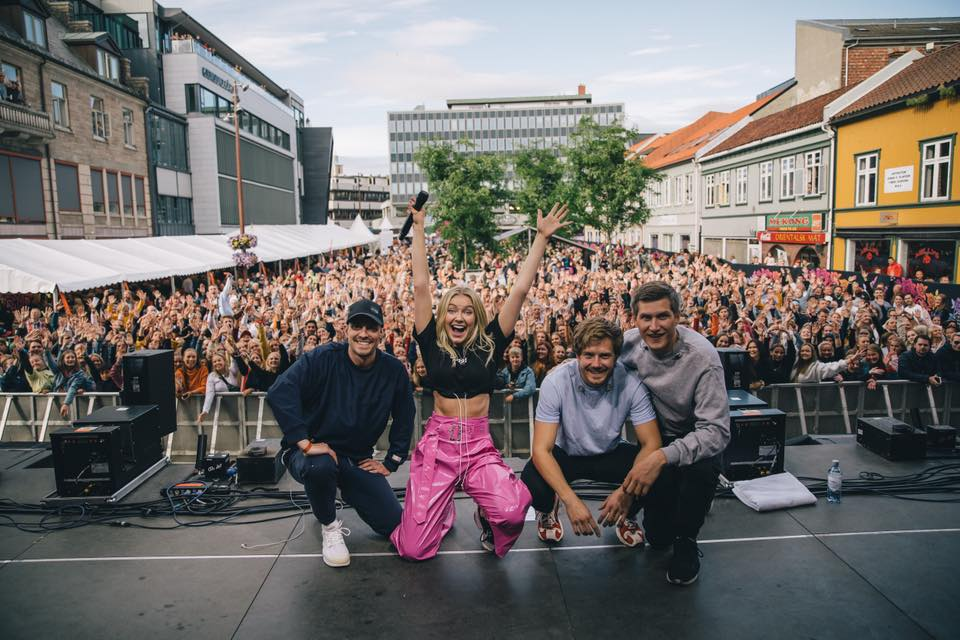 Astrid S under Idyll Festivalen 2018.